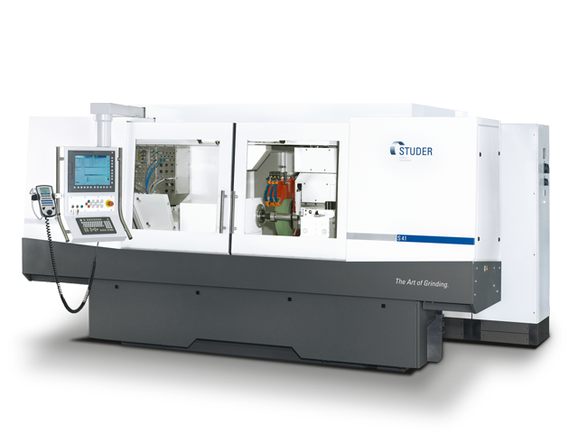 CNC-Universalrundschleifmaschine S41 der Fritz Studer AG.